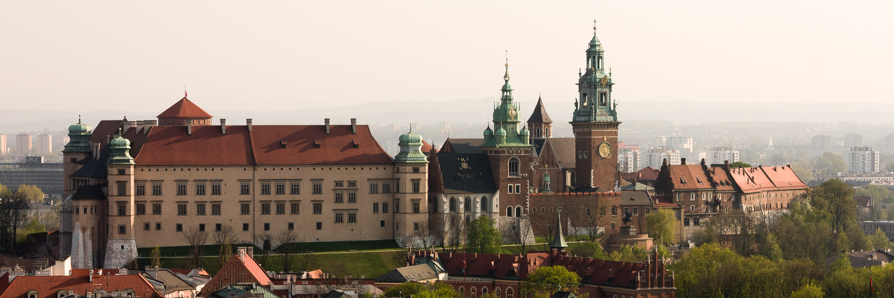 Zabudowa Wzgórza Wawelskiego: Zamek Królewski, Kościół katedralny św. Wacława i św Stanisława Biskupa, budynek dawnego seminarium duchownego (widok z wieży kościoła Mariackiego)